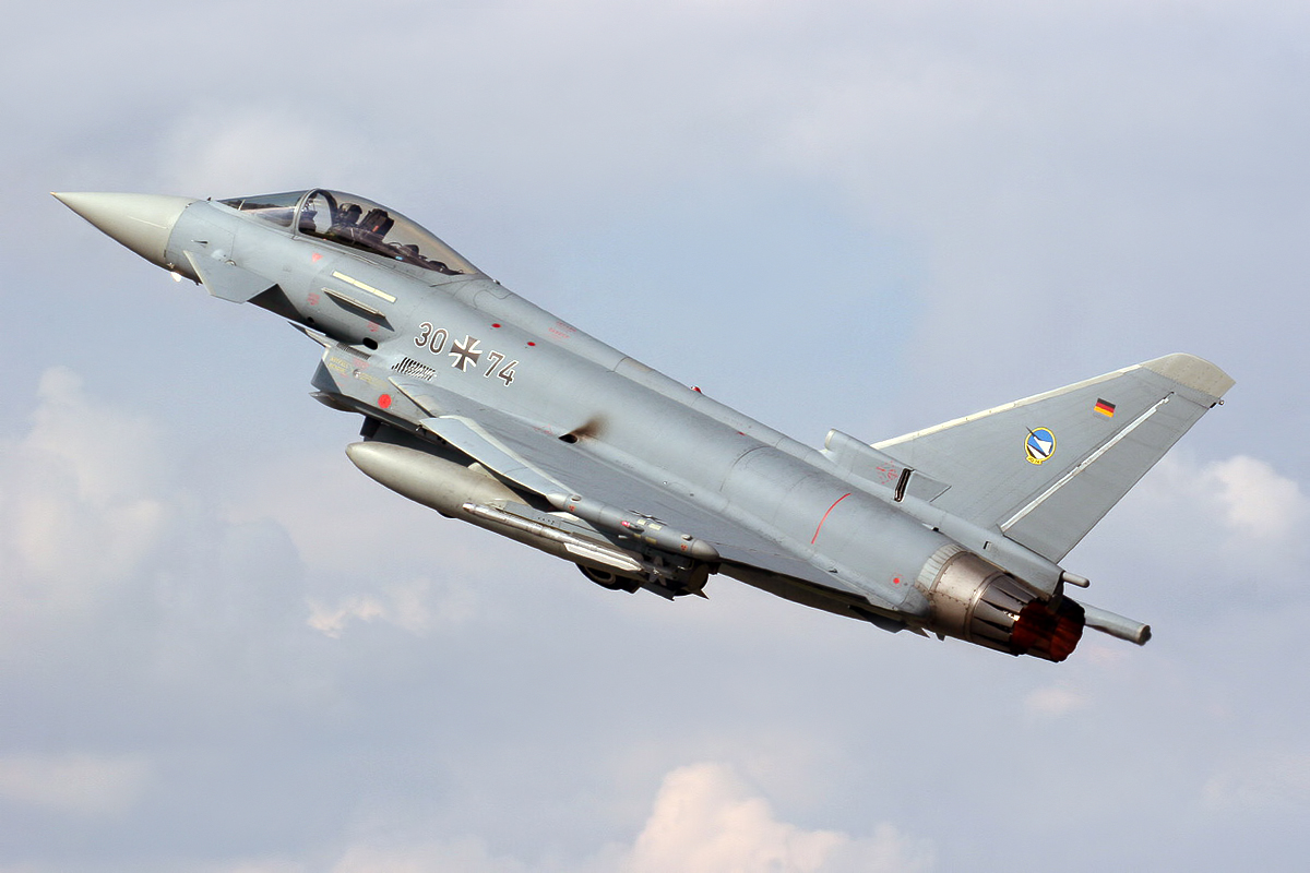 Neuburg (ETSN)